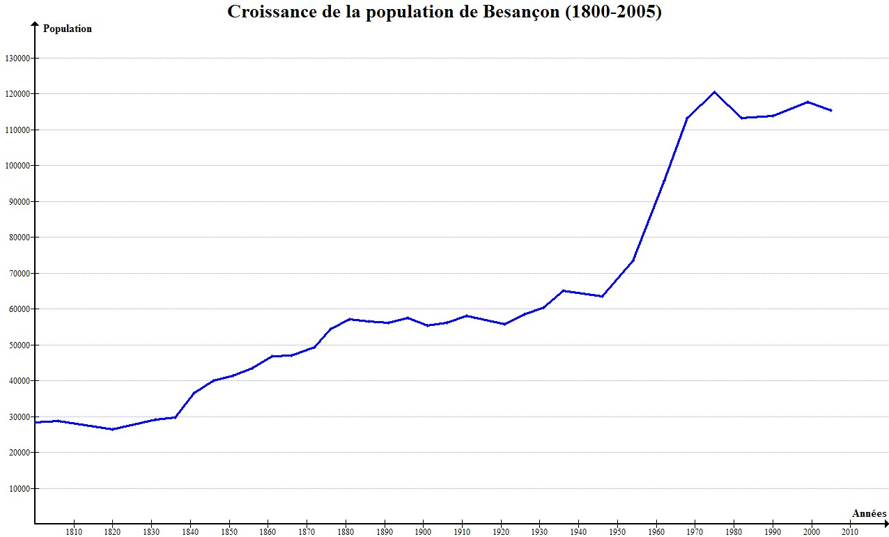 Courbe montrant la croissance de la population de Besançon entre 1800 et 2005